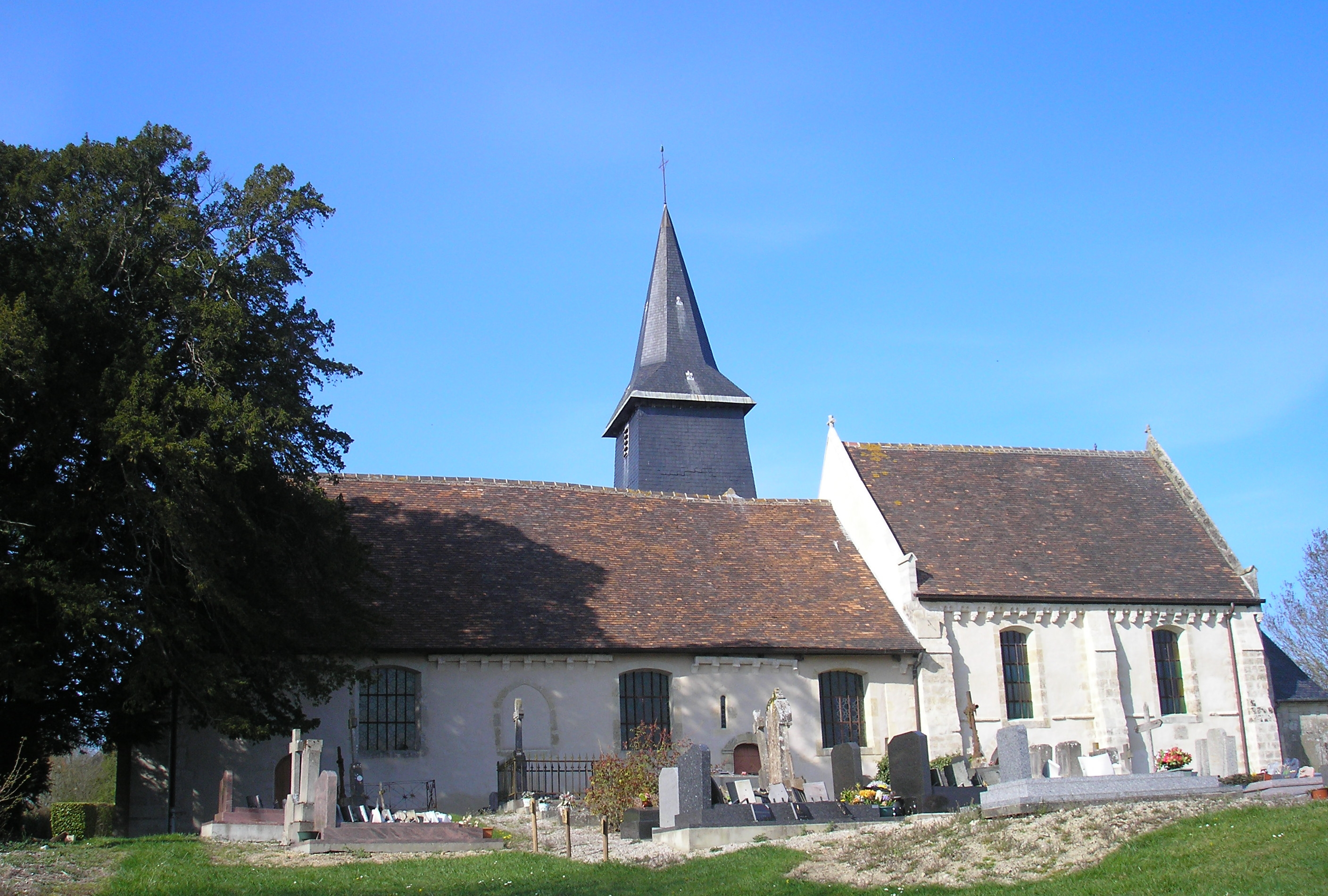 Douville-en-Auge (Normandie, France). L'église Saint-Blaise.